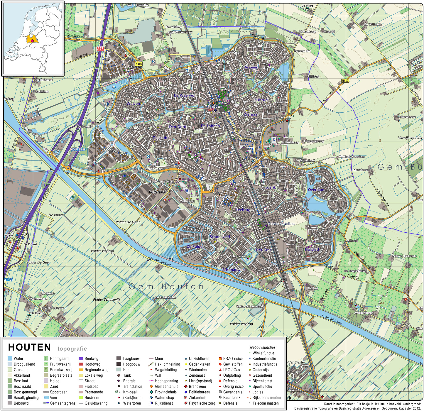 Topografisch beeld van de plaats Houten. Op basis van de GML open geodata van de BRT/Top10NL (basisregistratie Topografie, Kadaster 2012), vrijgegeven door Kadaster op 30-11-2012 onder de Creative Commons BY licentie. Gebouwvlakken vanuit Open Geodata BAG extract (december 2012). Samenstelling en kleurenschema: Jan-Willem van Aalst, met QuantumGIS en Photoshop.